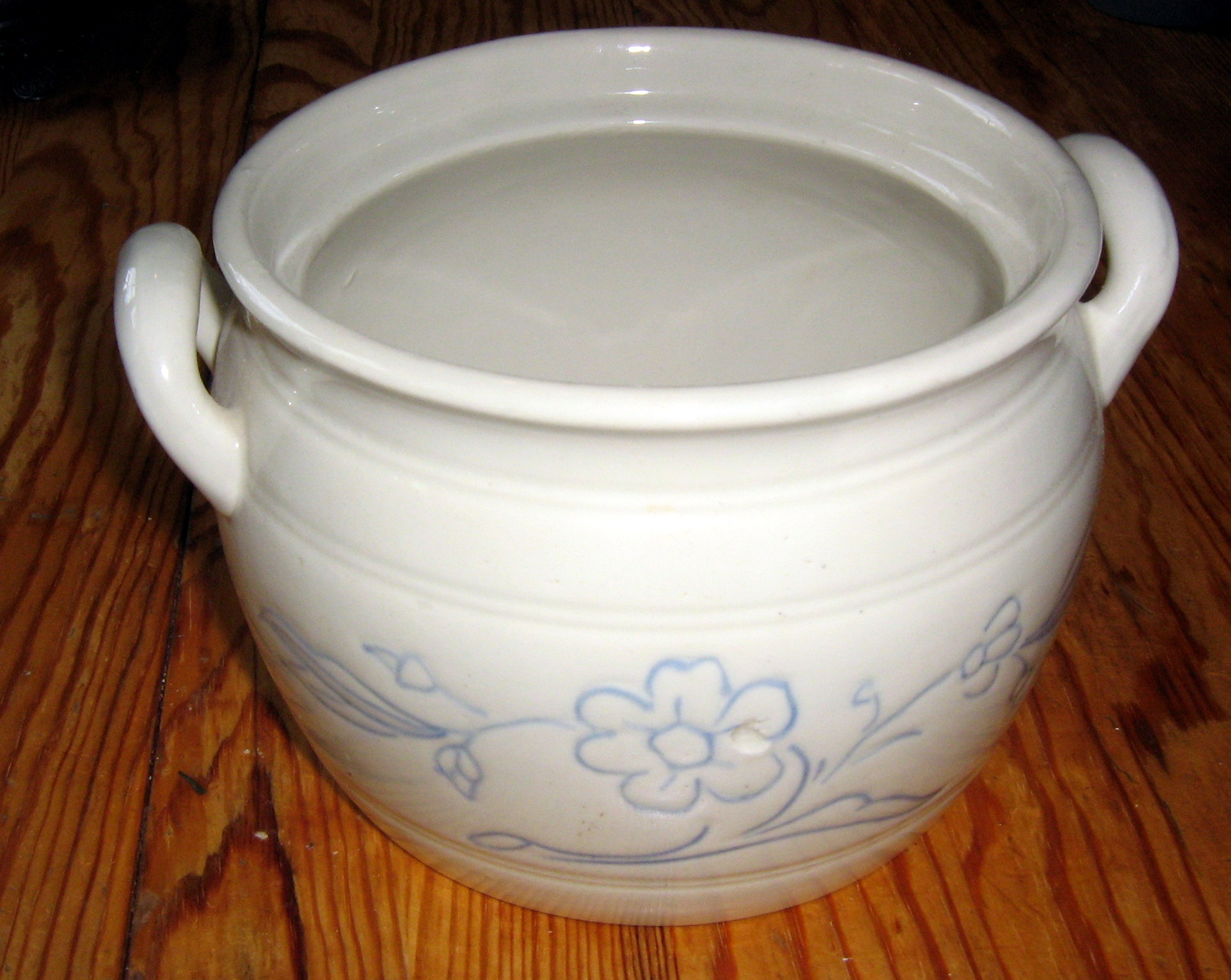 Rörstrandkruka, 5 liter, stengods